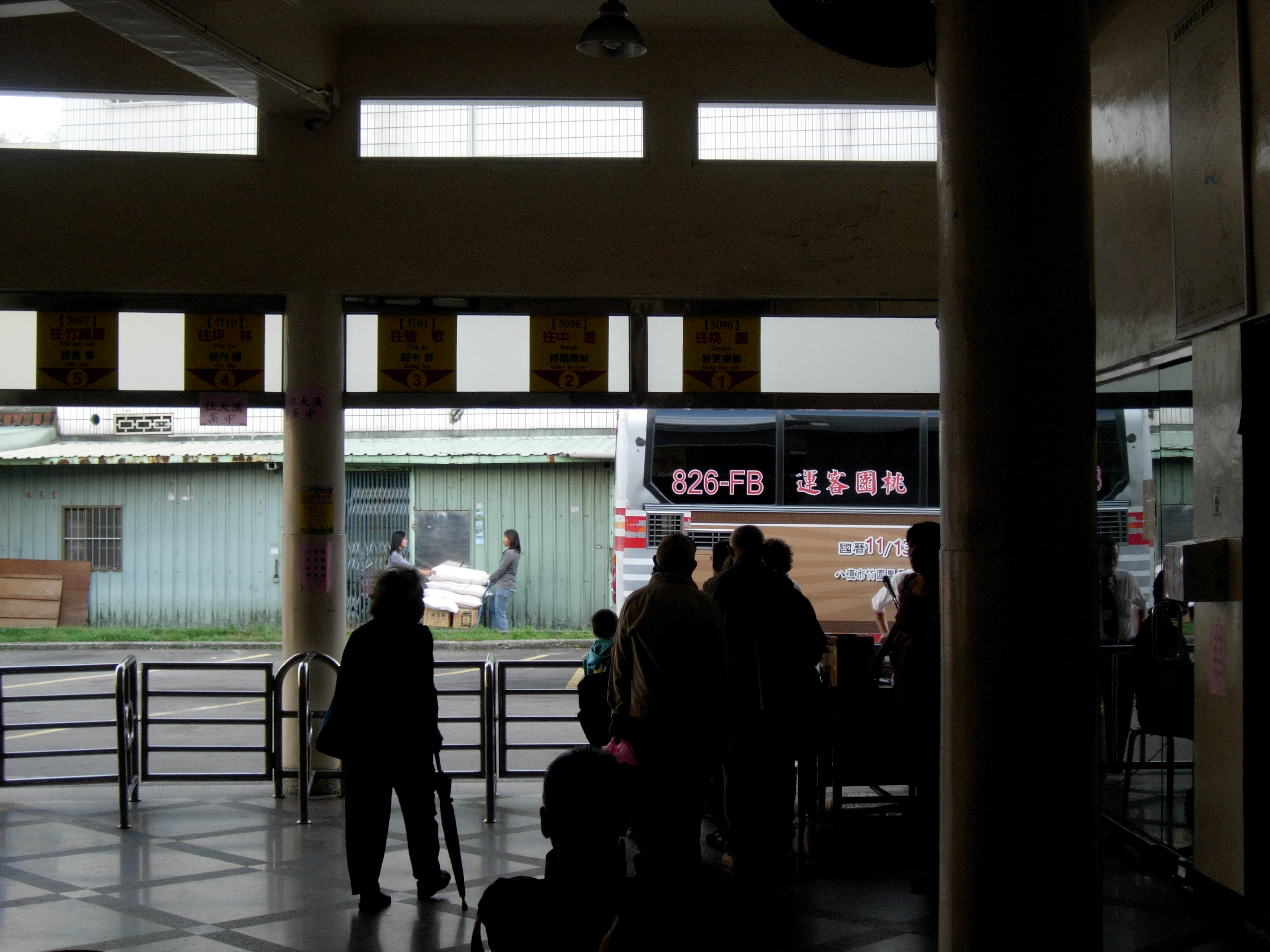 中文（台灣）: 桃園客運大溪站月台1